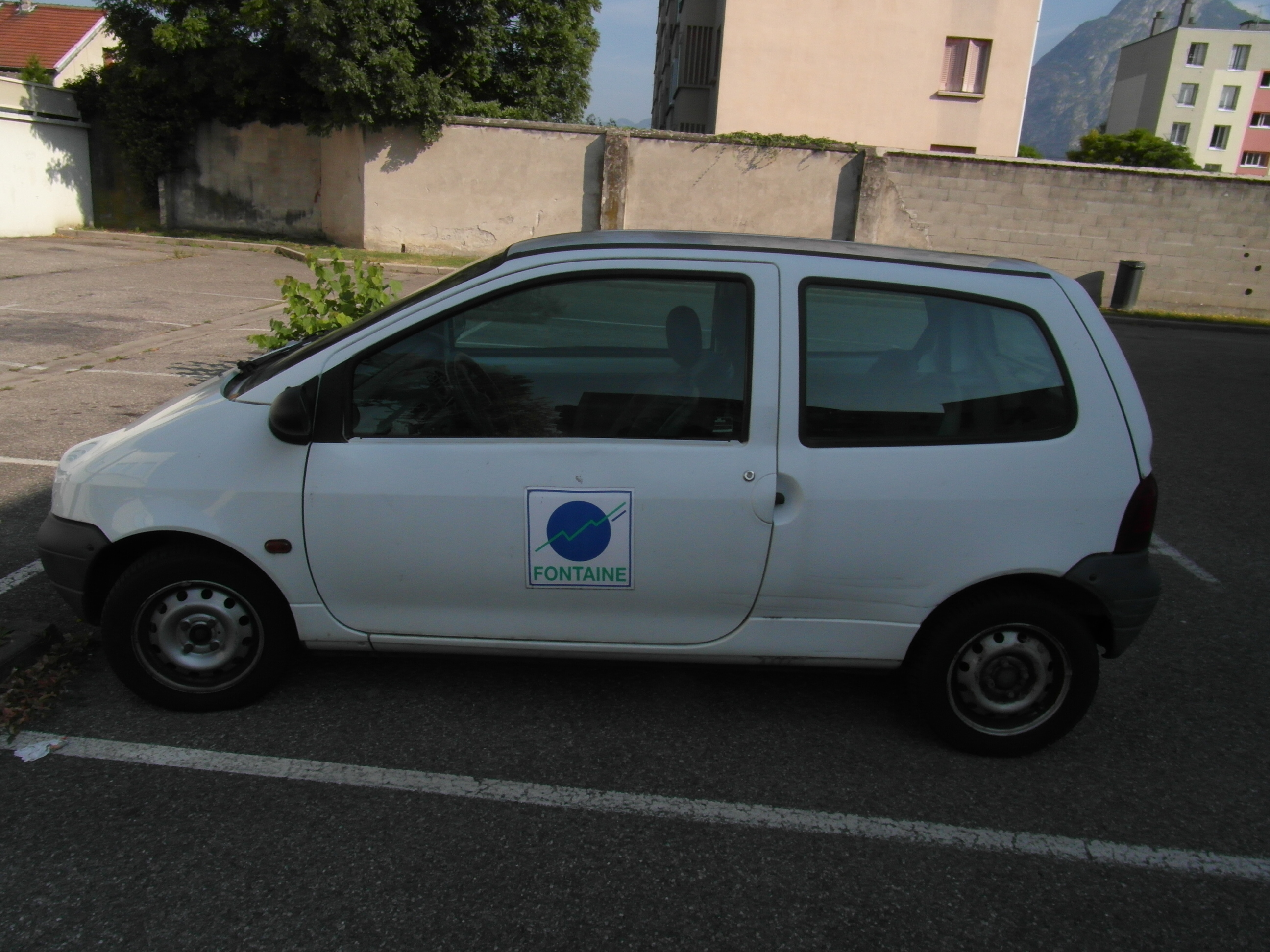 Voiture de service municipal de Fontaine